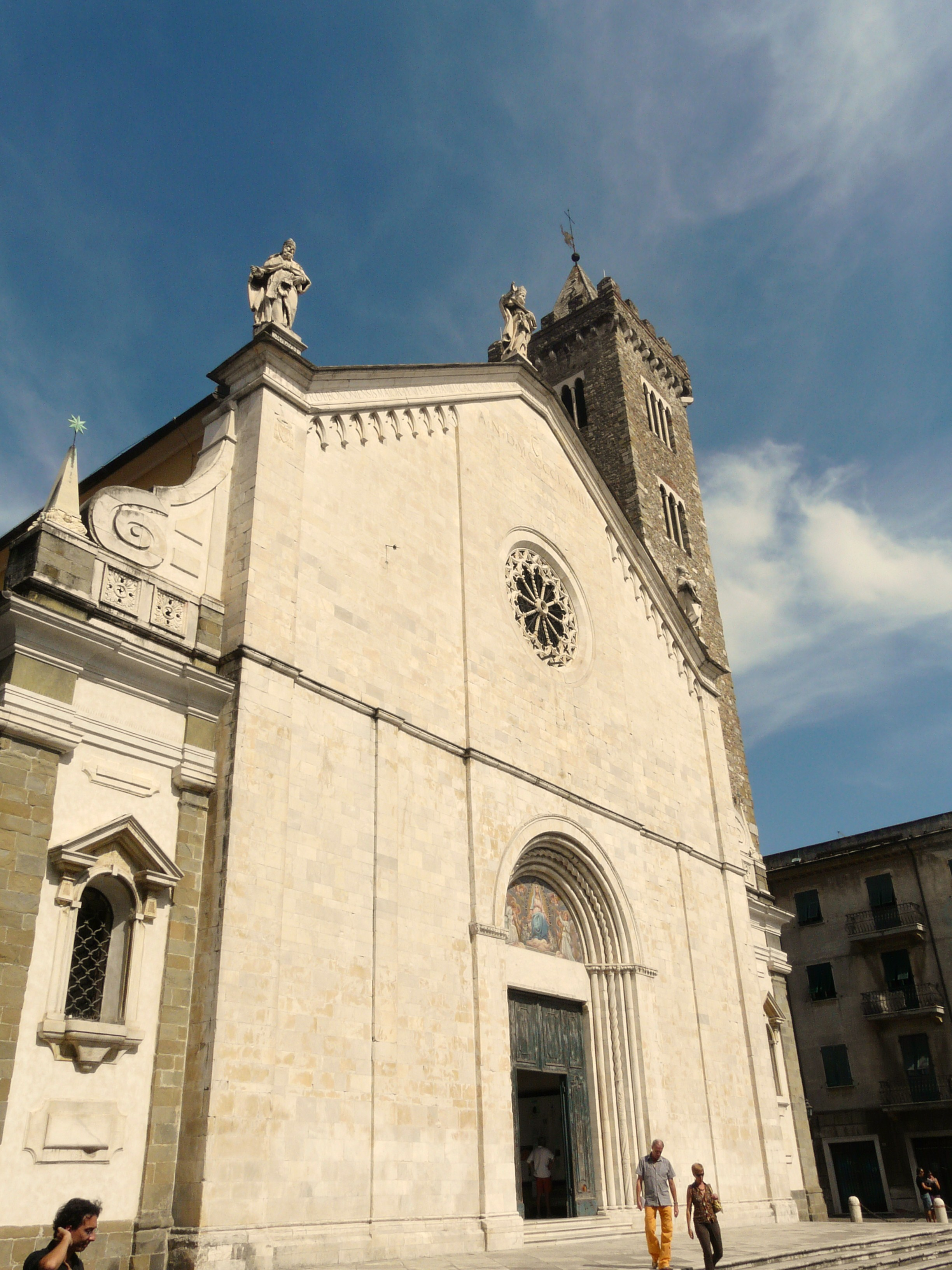 Facciata della Cattedrale di Santa Maria Assunta, Sarzana, Liguria, Italia